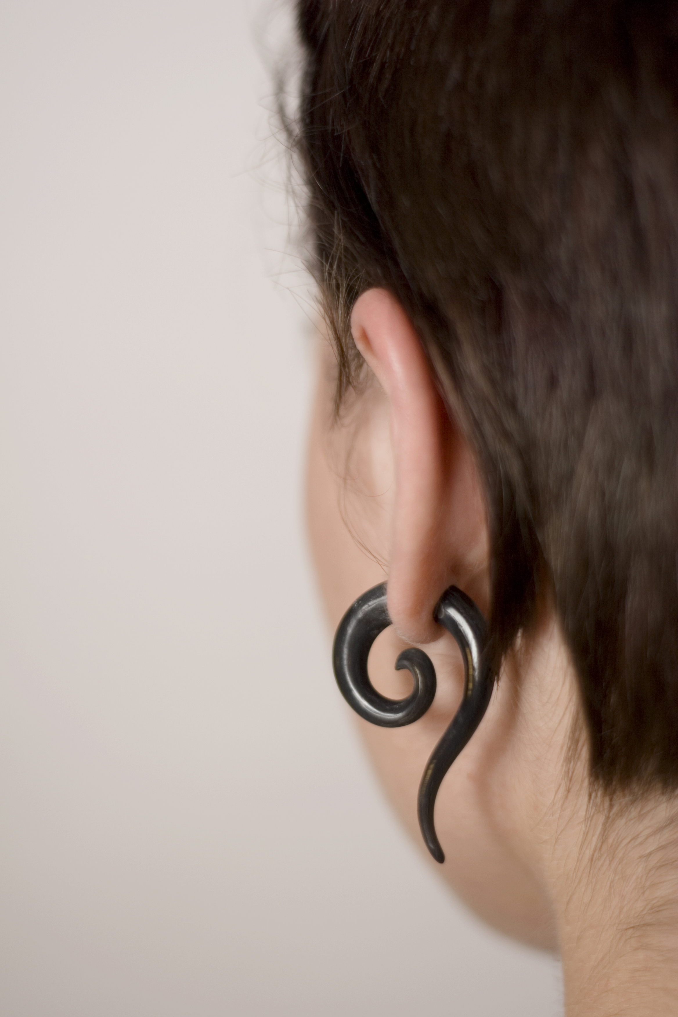 Ear spiral